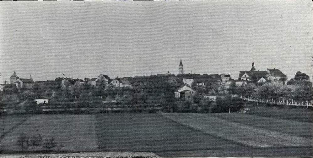 Panorama Białej ok. 1925